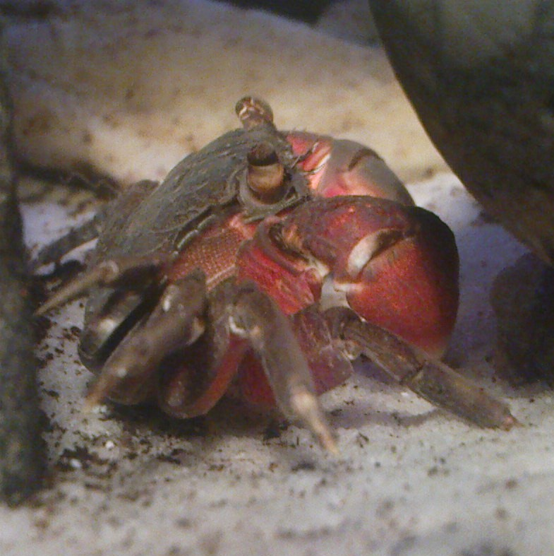 Pseudosesarma moeschi nach der Häutung